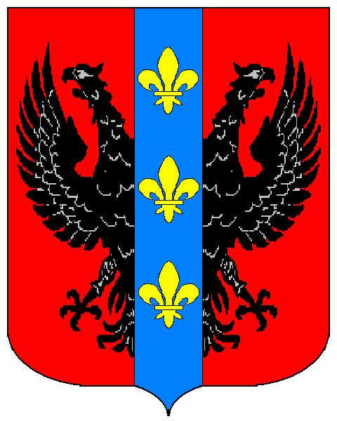 Grb obitelji Capogrosso